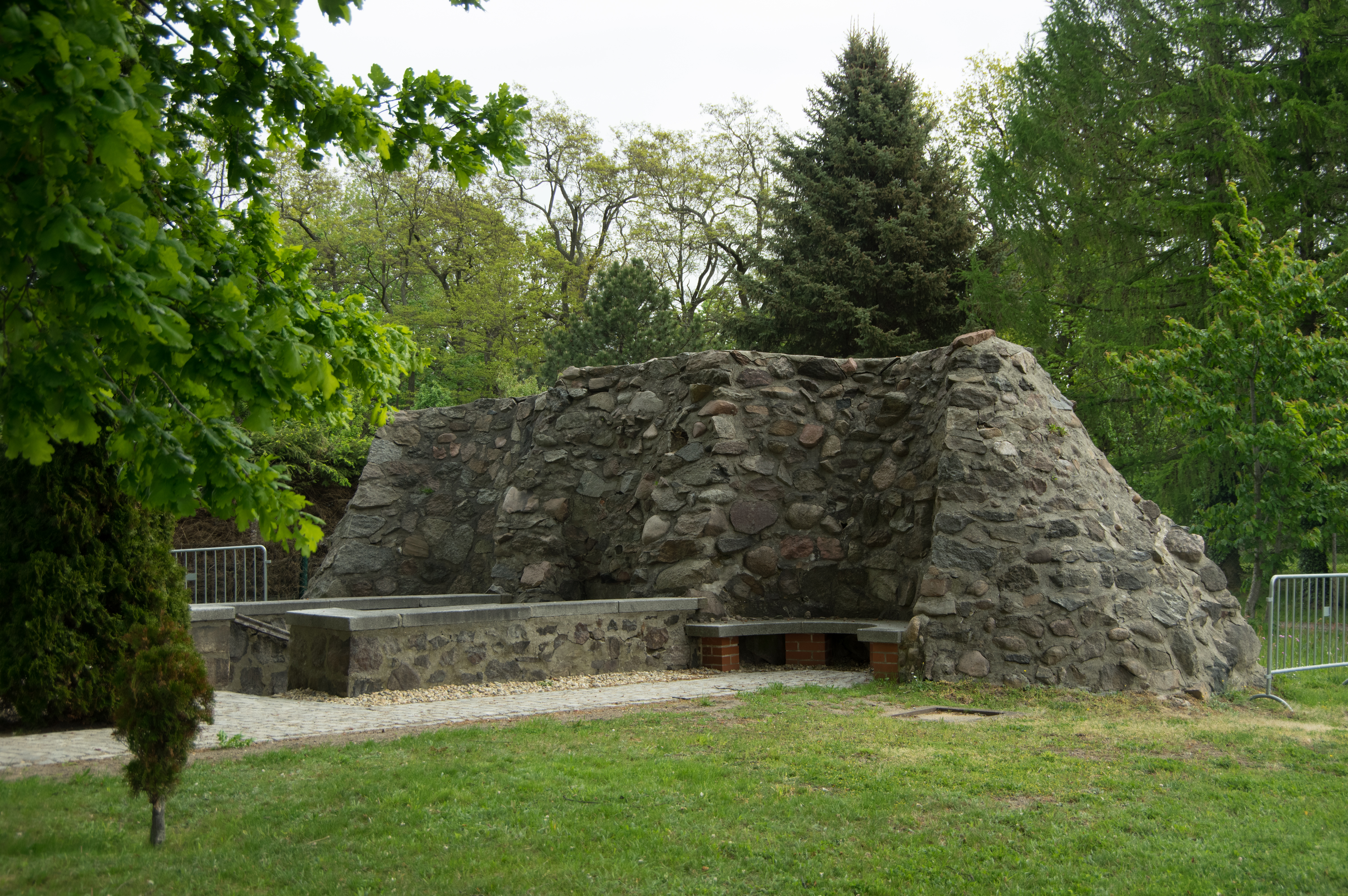 Treuenbrietzen, Ortsteil Dietersdorf in Brandenburg. Der Lutherbrunnen ist denkmalgeschützt.